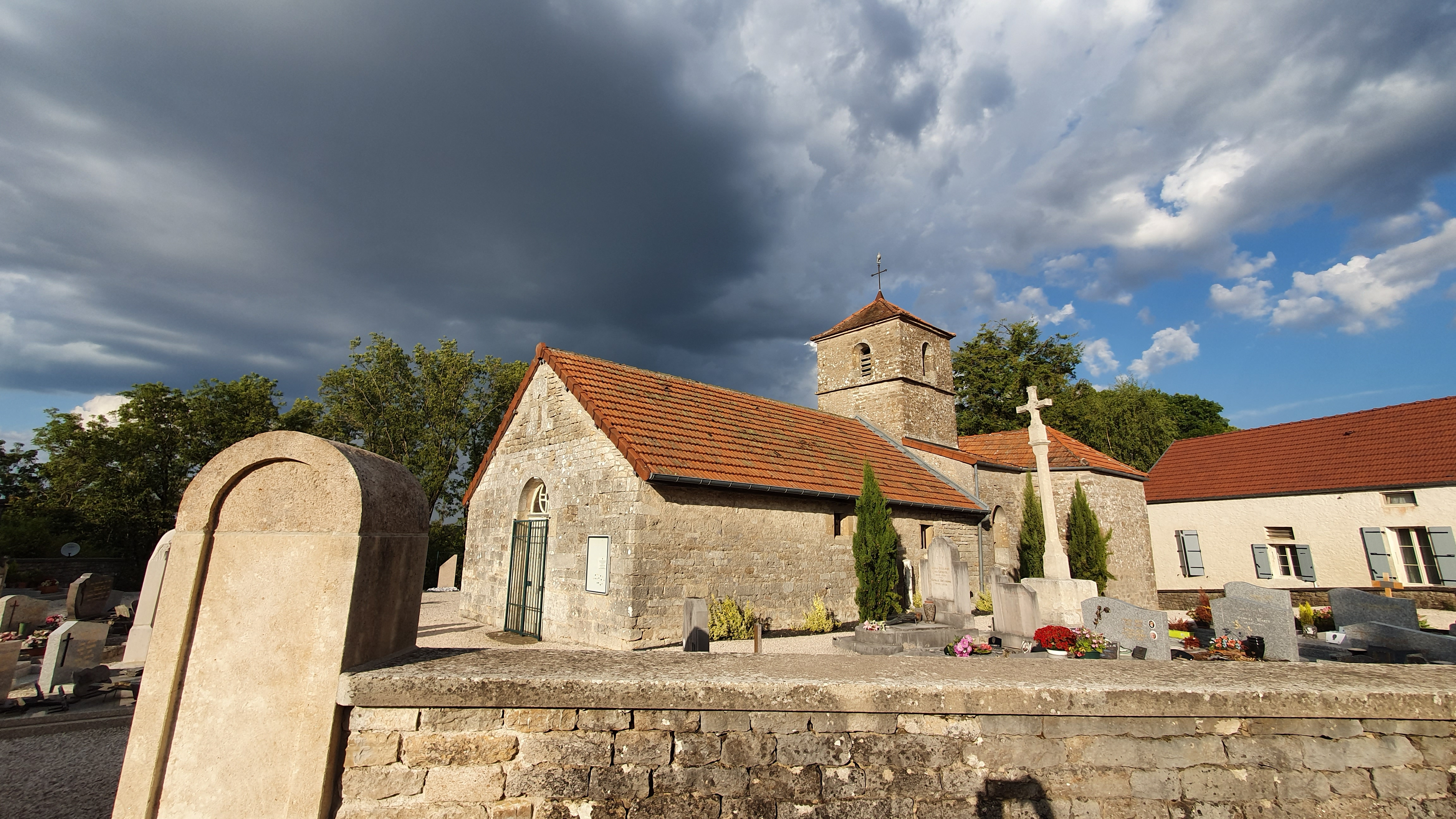 église